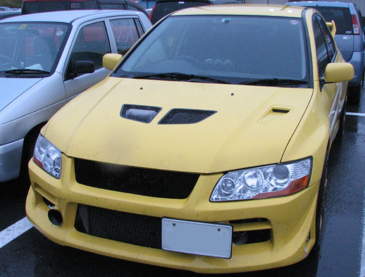 Mitsubishi-Motors, Lancer-Evolution VII.三菱自動車ランサーエボリューションⅦ。